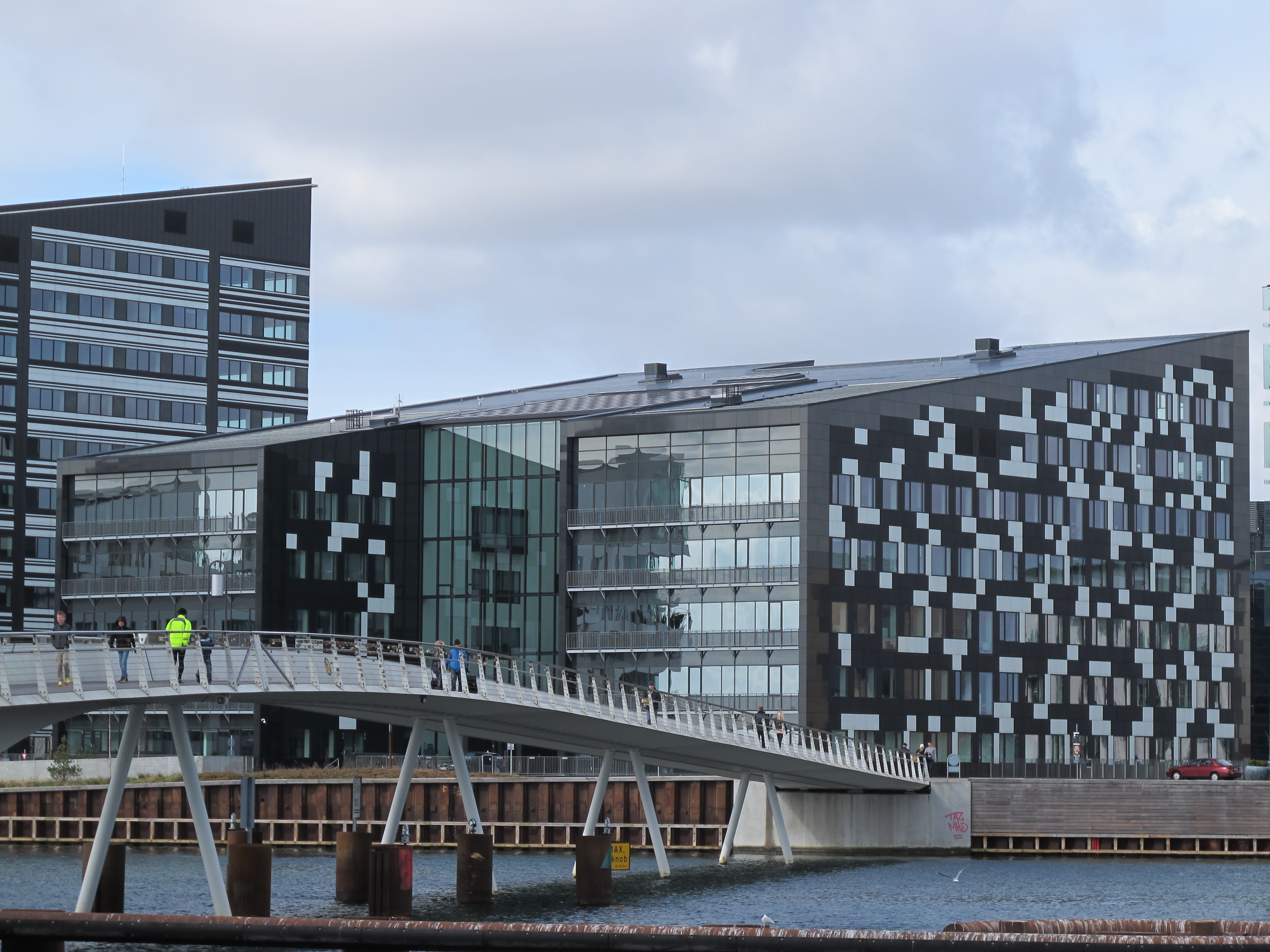 Bryggehroen bridge with Havneholmen as a backdrop in Copenhagen, Denmark